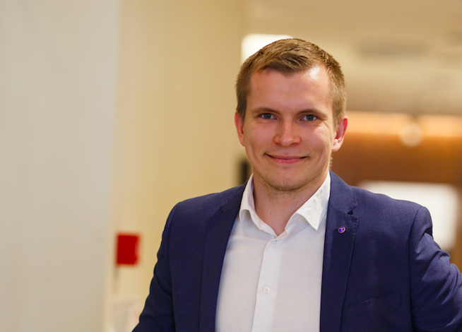 Foto